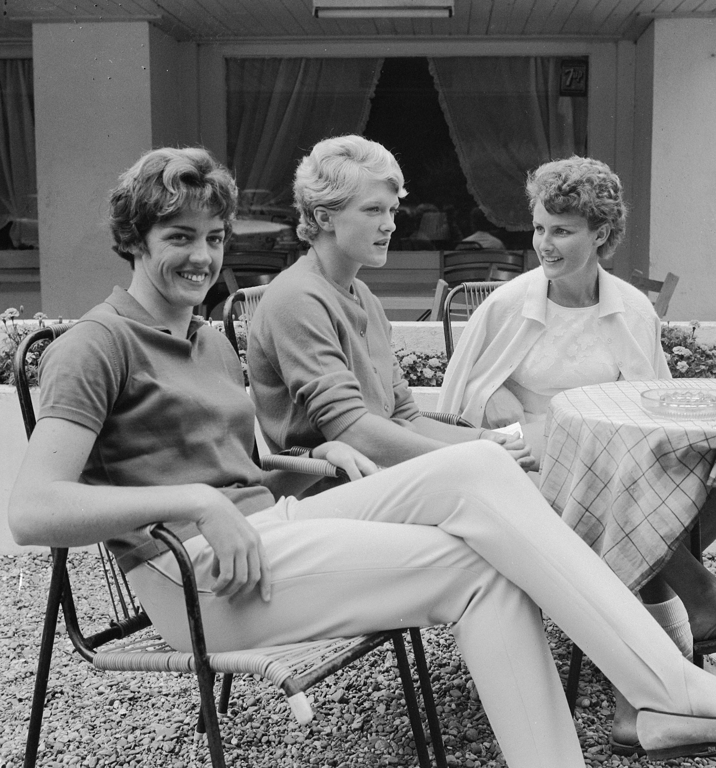 Tennis in Hilversum in het restaurant, v.l.n.r. Margaret Smith , Robbin Ebbern , Lesley Turner